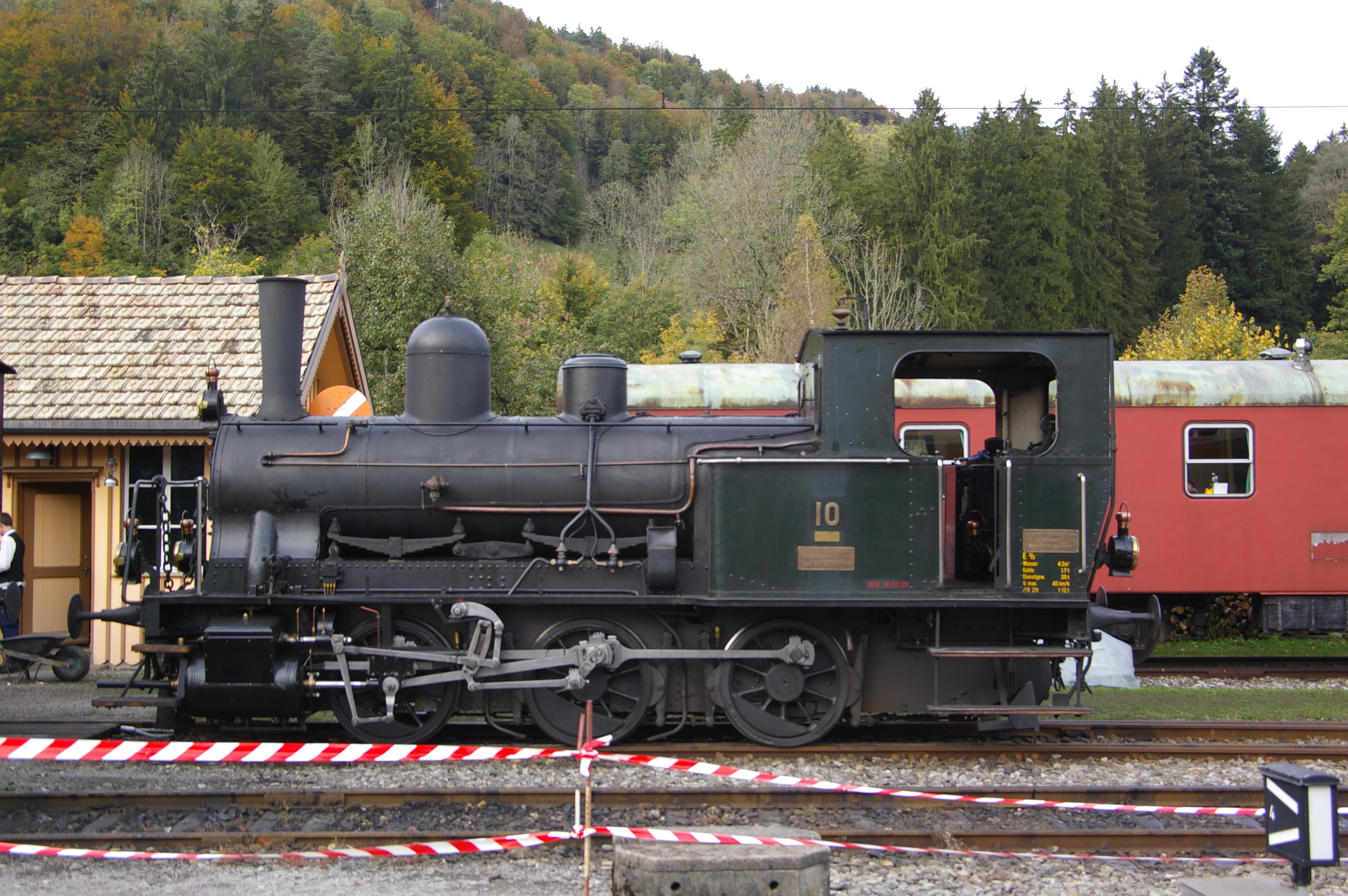 Dampflokomotive E 3/3 Nr. 10 des Dampfbahn-Vereins Zürcher Oberland im Bahnhof Bauma, gebaut 1907 in der Schweizerischen Lokomotiv- und Maschinenefabrik Winterthur für die Schweizerischen Bundesbahnen (Betreibsnummer 8476), 1962—2001 Werklokomotive der Chemischen Fabrik Uetikon.